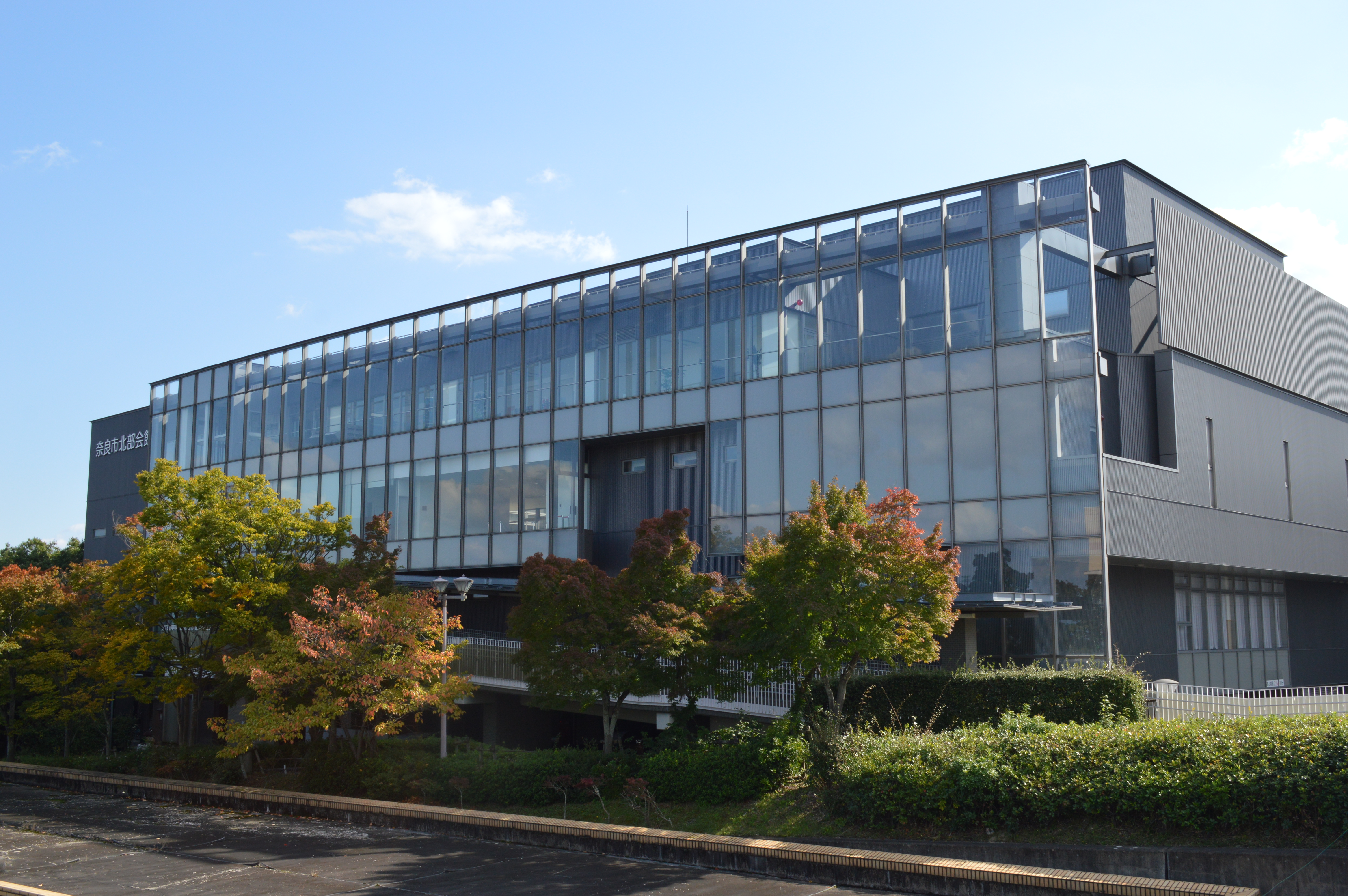 近鉄高の原駅西口にある奈良市北部会館。奈良市立北部図書館などが入っている。